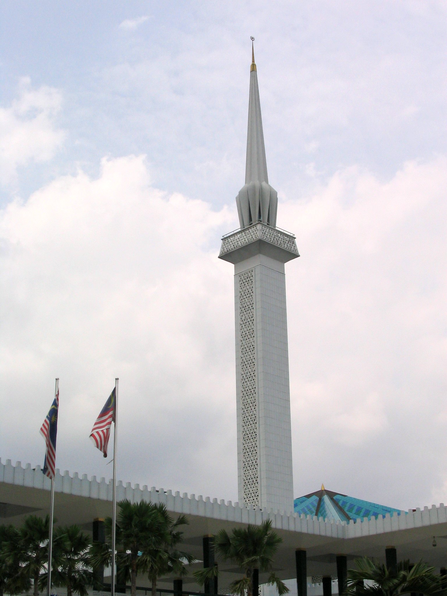 National Mosque (Masjid Negara) in Kuala Lumpur, Malaysia.